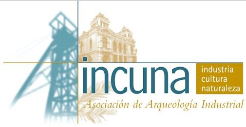 logo de fundacion incuna